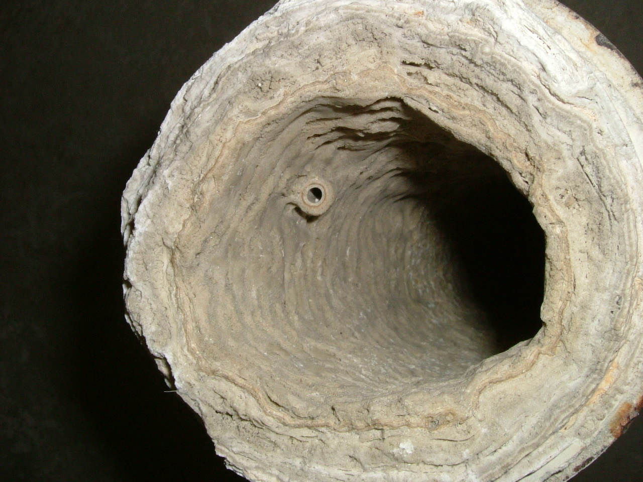 Sinterablagerungen von Thermalwasser an einer Wasserleitung aus der Kaiserquelle in Aachen.